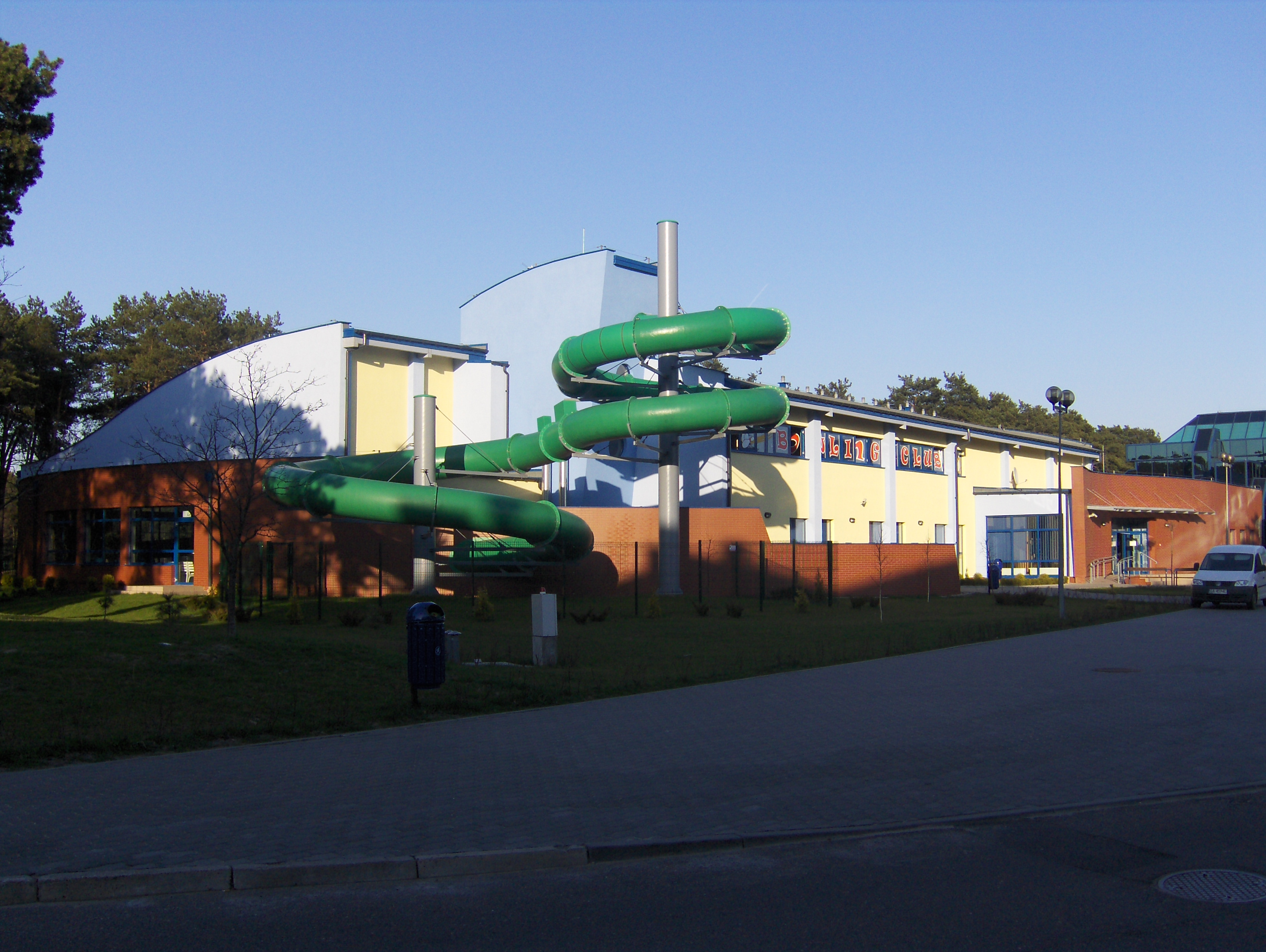 Aquapark "Wisła" - Solec Kujawski